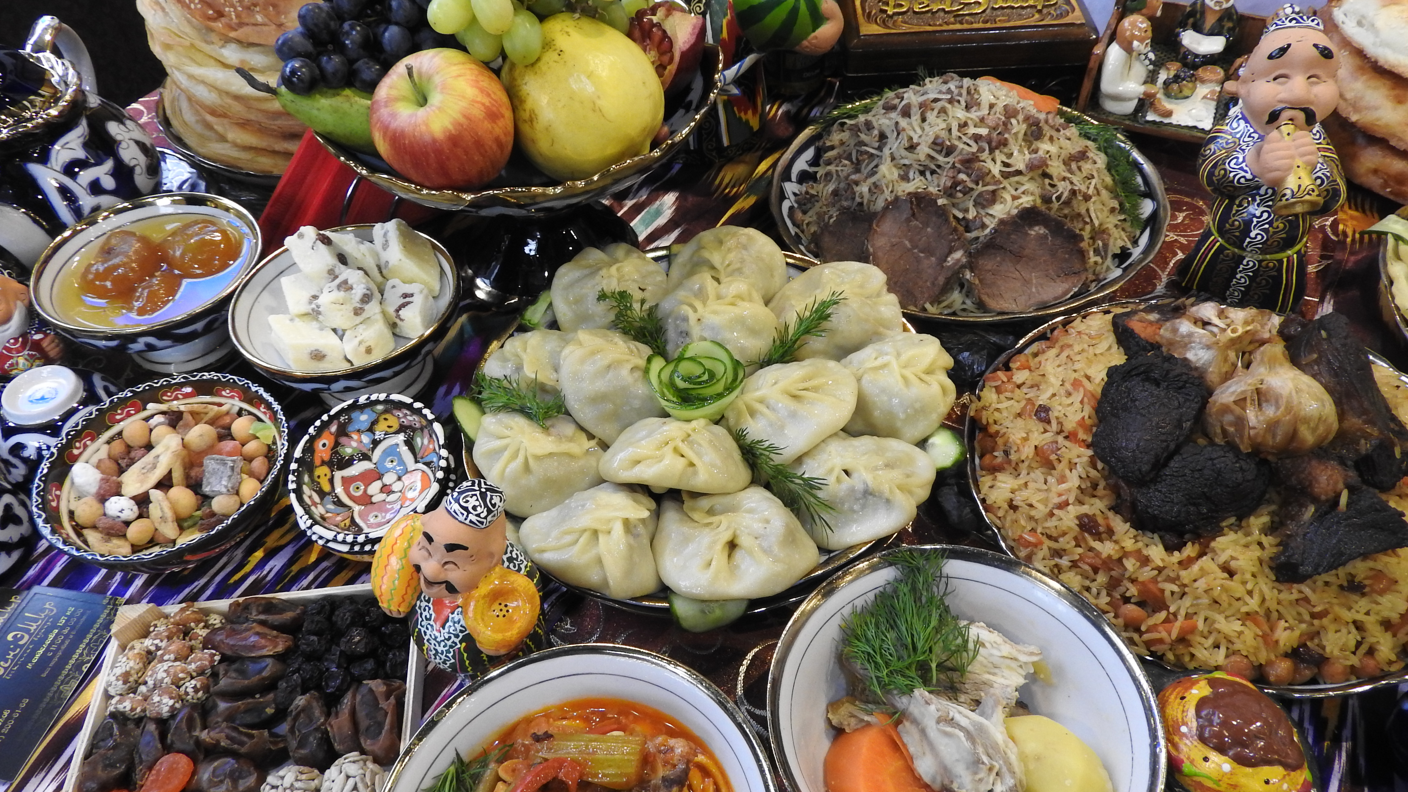 Выставка в Уфе "УФА-ЛАДЬЯ. АРТ.РЕМЕСЛА. СУВЕНИРЫ".